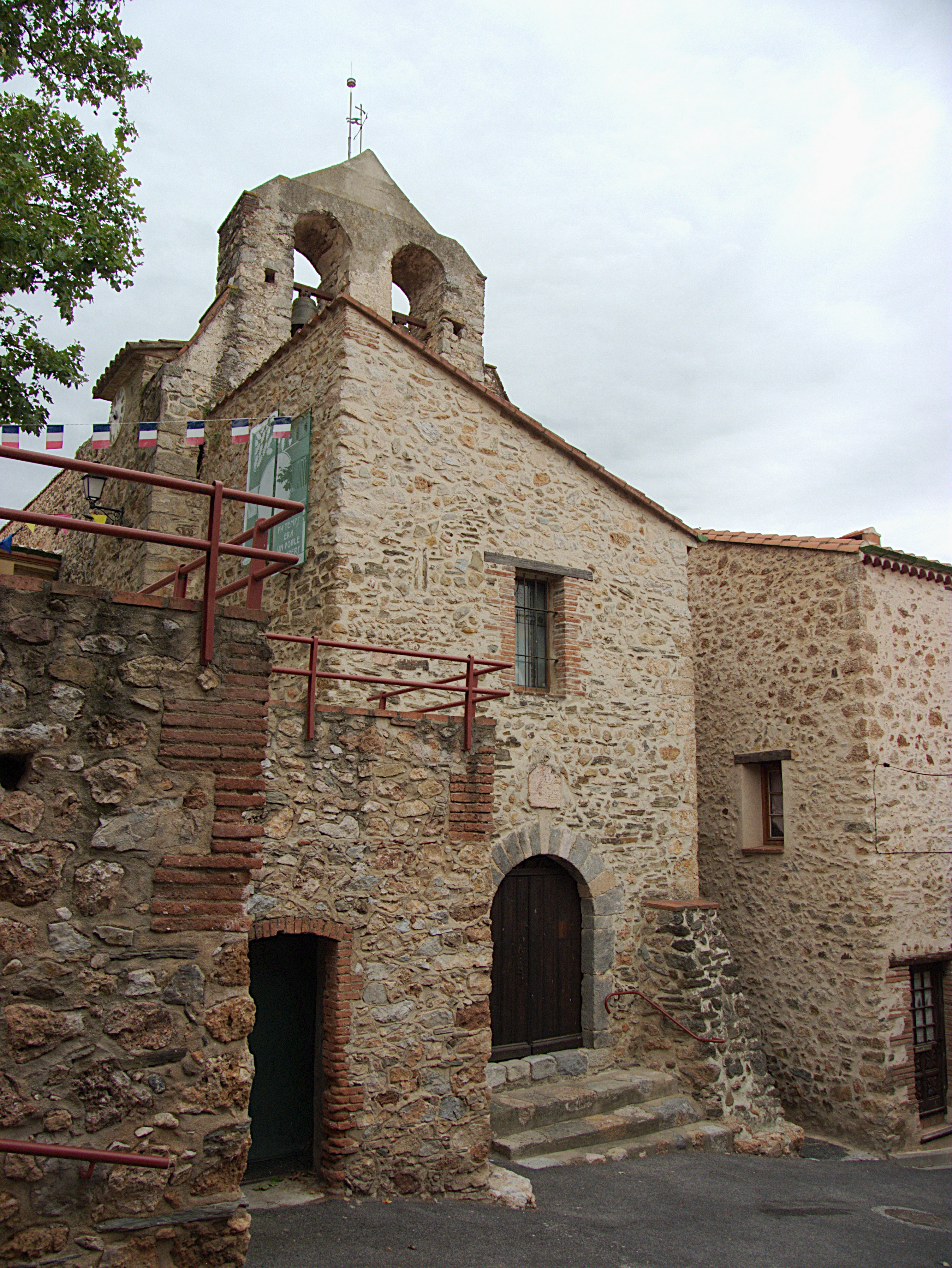 Maison accolée à l'église Saint-Martin, Llauro (Pyrénées-Orientales, Languedoc-Roussillon, France)